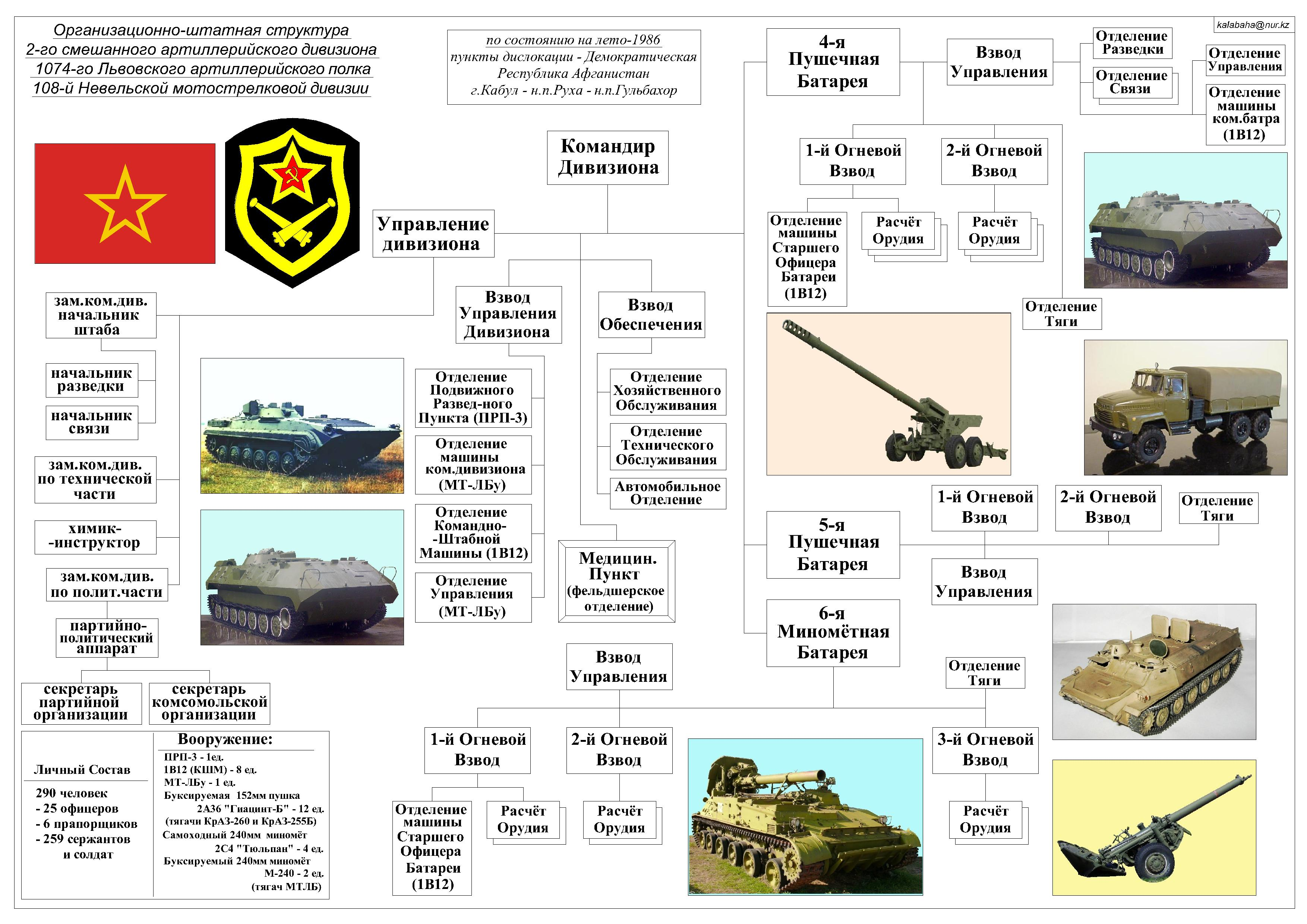 Организационно-штатная структура 2-го смешанного артиллерийского дивизиона 1074-го Львовского артиллерийского полка 108-й Невельской мотострелковой дивизии на лето-1986. Собственная работа на основе данных взятых с сайта 108-й мсд данных взятых у Бешкарева Александра Ивановича "ПЕРЕЧЕНЬ СОВЕТСКИХ ВОИНСКИХ ЧАСТЕЙ В АФГАНИСТАНЕ (1979-1989 гг.)" с сайта и данных предоставленных ветеранами полка. Отчерчено в AutoCAD.